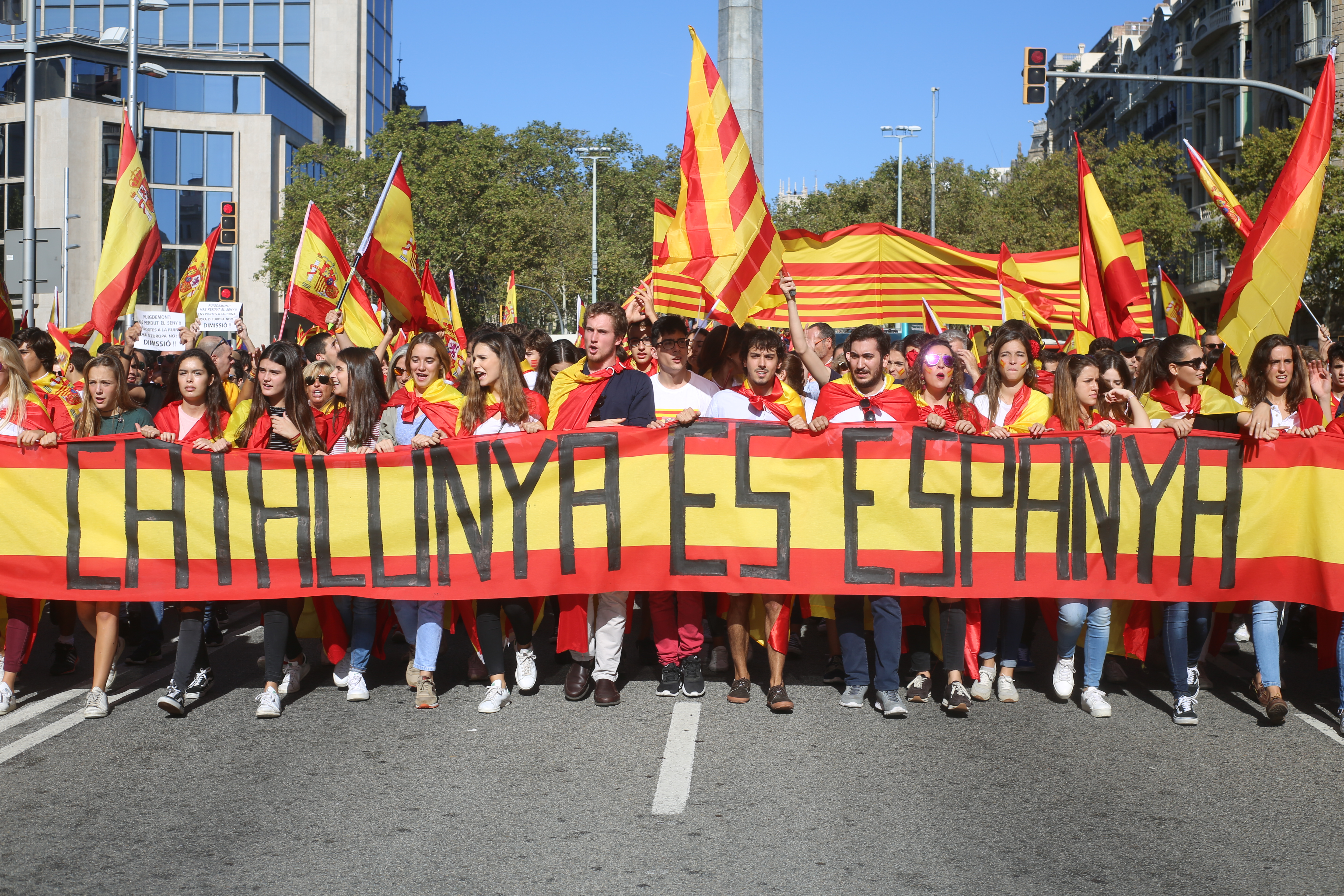 08.10.2017 Manifestació "Prou! Recuperem el seny" - Barcelona